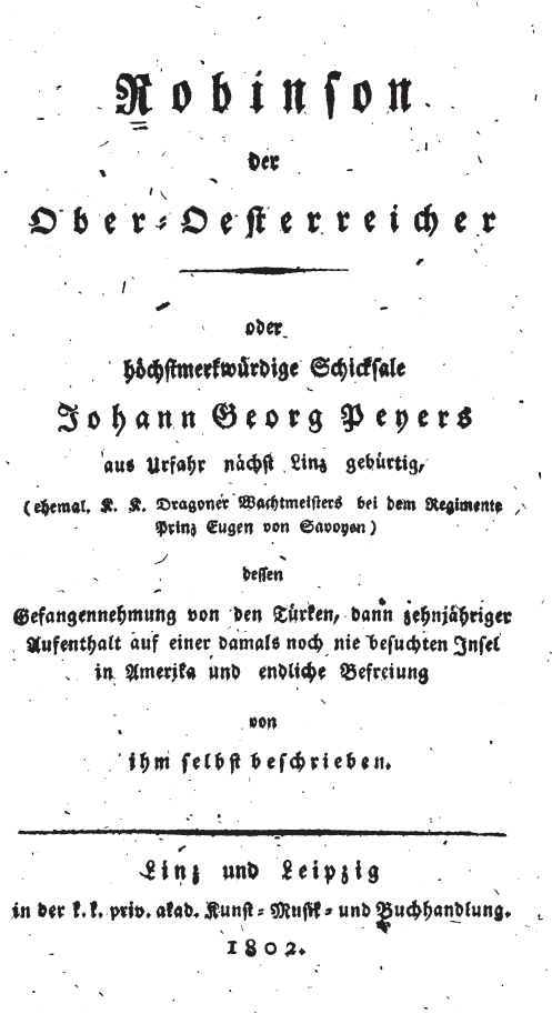 Titelblatt der Erstausgabe des Robinson der Ober-Österreicher aus dem Jahr 1802.